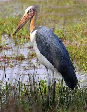 Leptoptilos javanicus